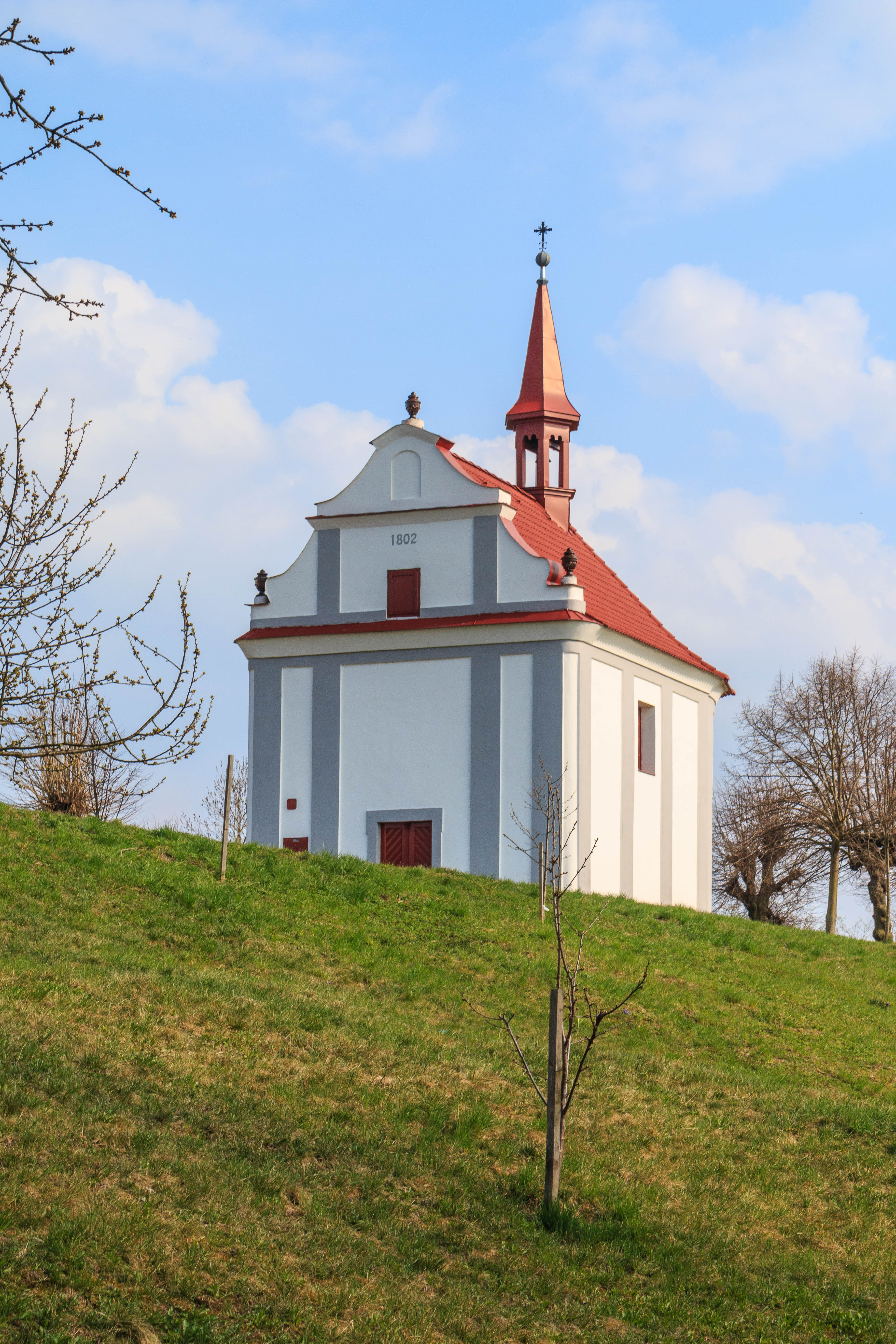 Horka kaple